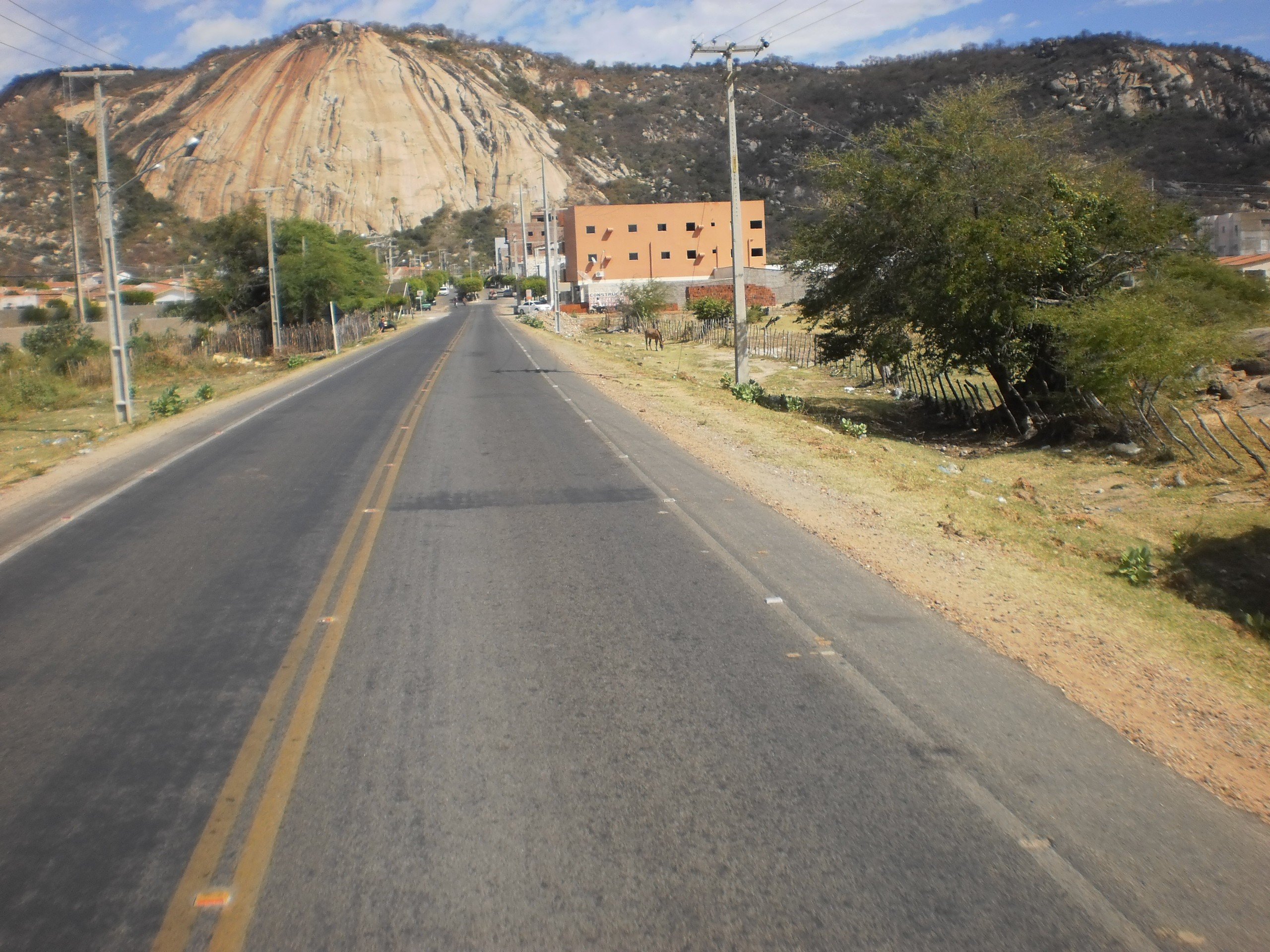 PB-293 na entrada (sentido norte-sul) de Brejo do Cruz, Paraíba, Brasil.